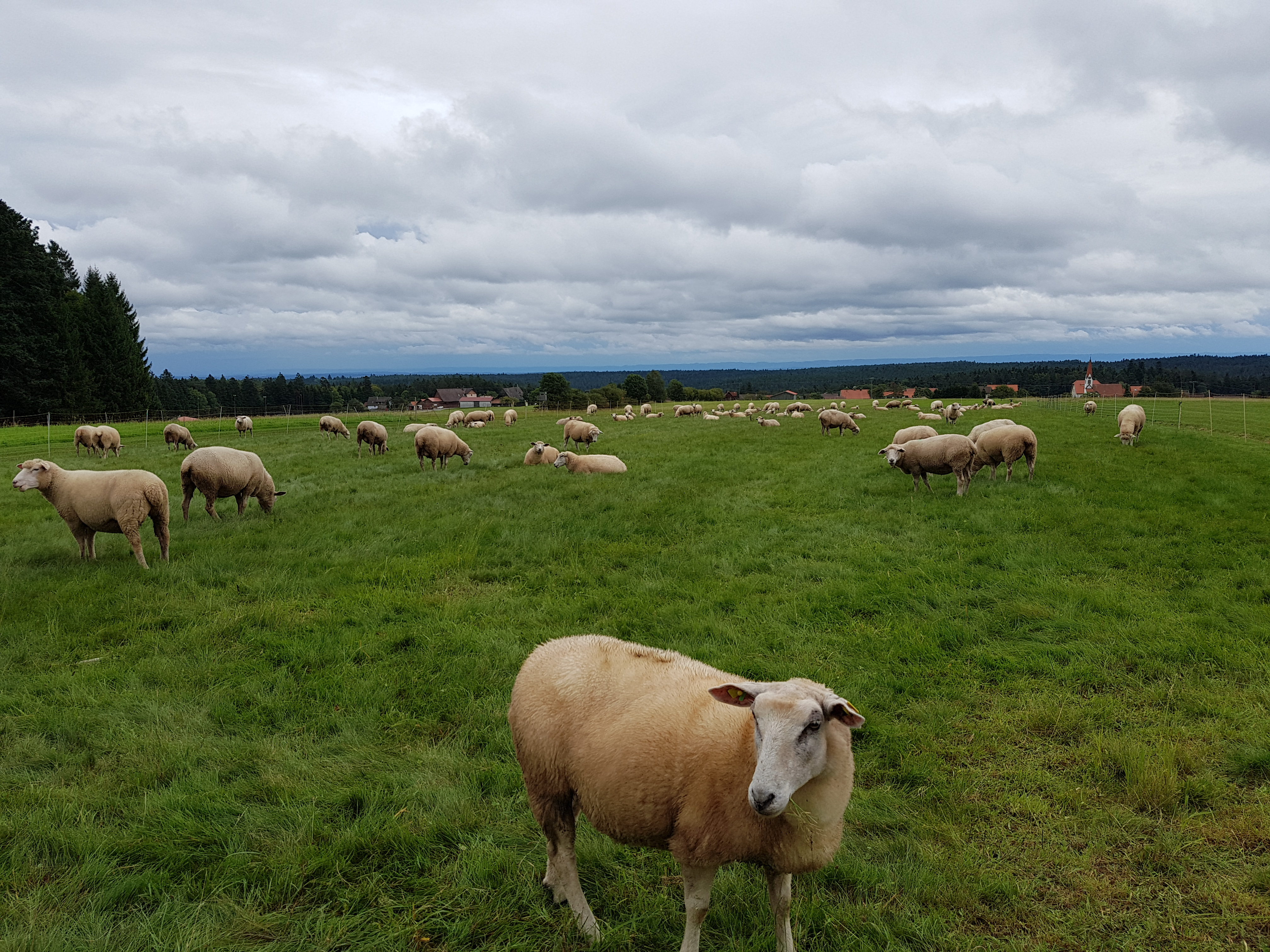 Blick von der Schafweide in Richtung Aichelberg und Jugendstilkirche.